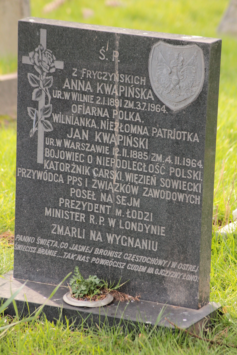 Grob Jana Kwapinskiego w Londynie, Streatham Cemetery